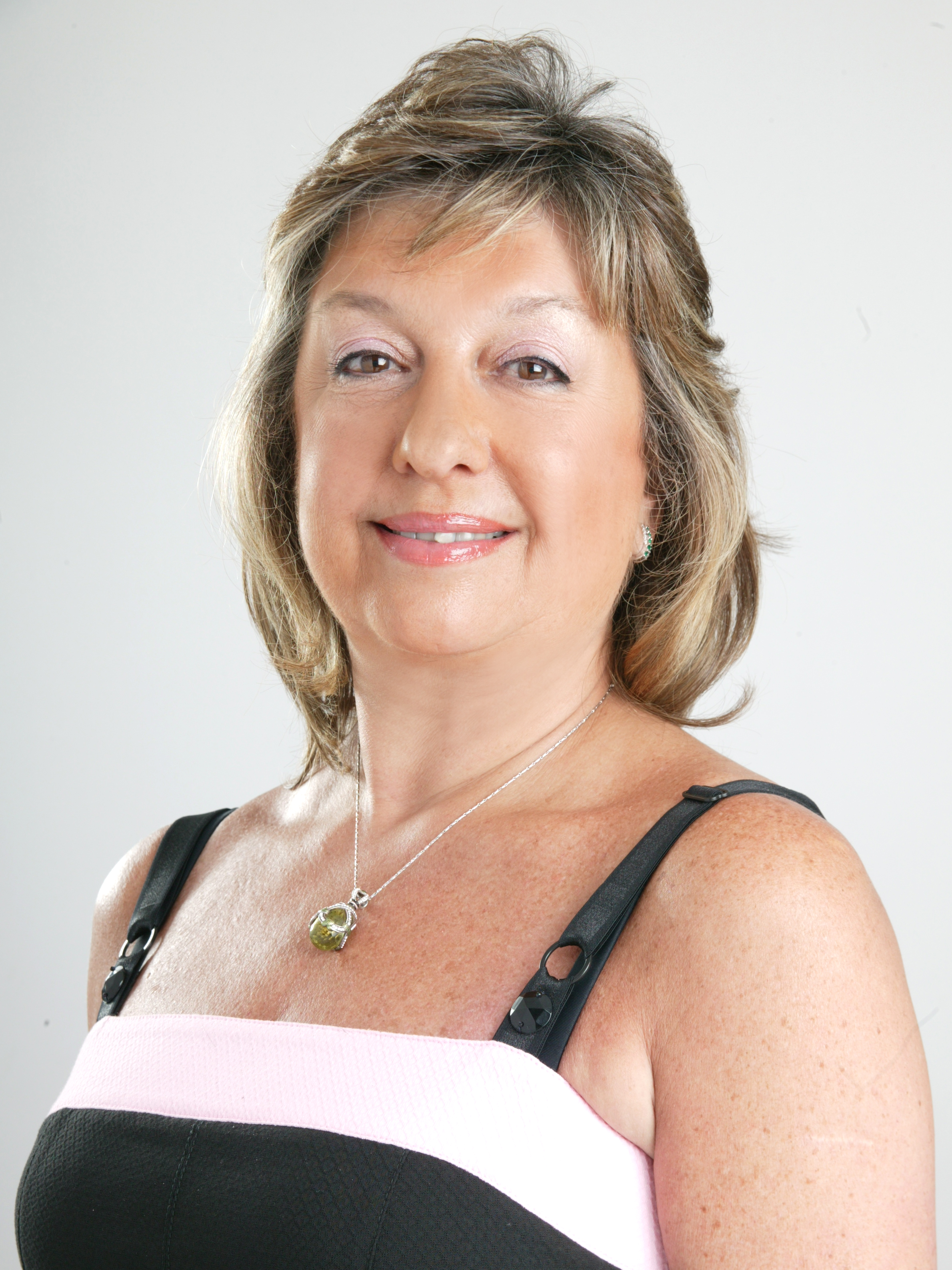 Jimena Bronfman, política chilena.